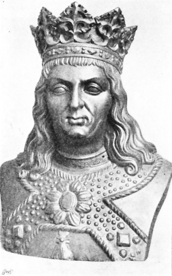 ilustracja z książki Zygmunta Glogera "Encyklopedia staropolska tom IV" publikacja Wydawnictwa Piotra Laskauera i S-ki Warszawa 1903. Jan Olbracht, z grobowca na Wawelu.